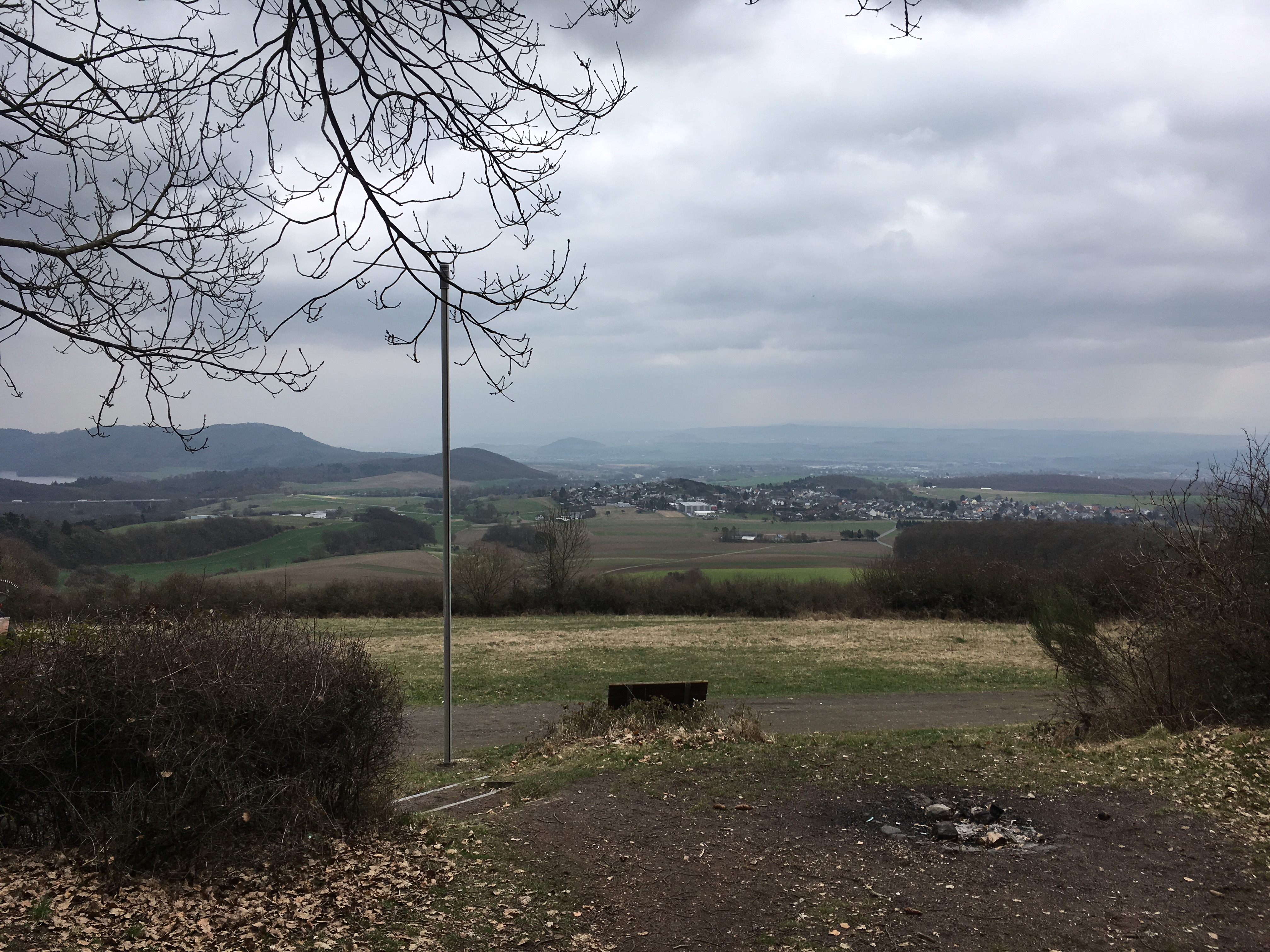 Der Waldseepfad Rieden ist ein rund 14 km langer Rundwanderweg in Rieden, Landkreis Mayen-Koblenz in Rheinland-Pfalz. Er ist einer von 26 Prädikatswanderwegen, die als Traumpfade vermarktet werden.